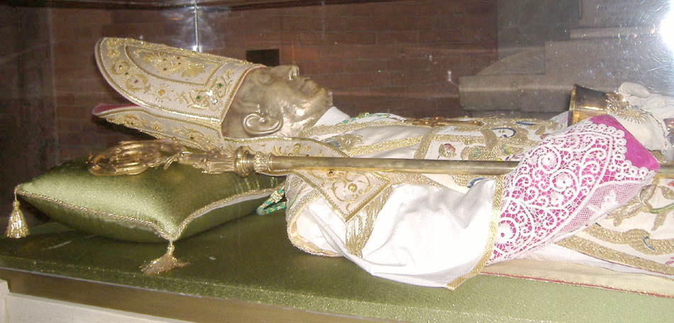 L' urna che conserva le spoglie del Beato Scalabrini, nel Duomo di Piacenza.